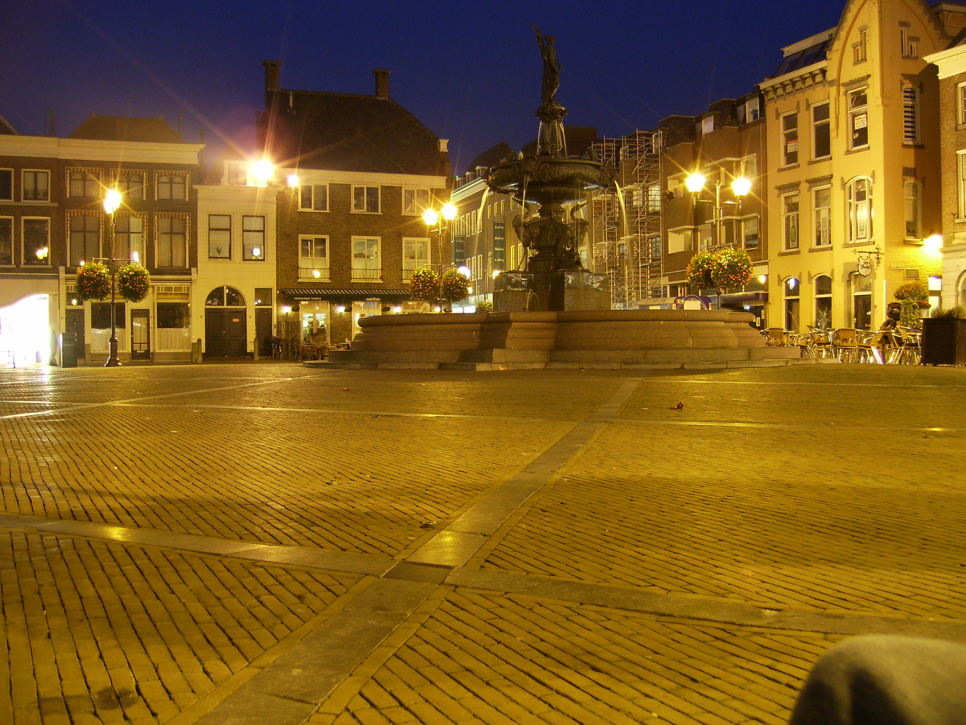 eigen werk Ruben Alexander